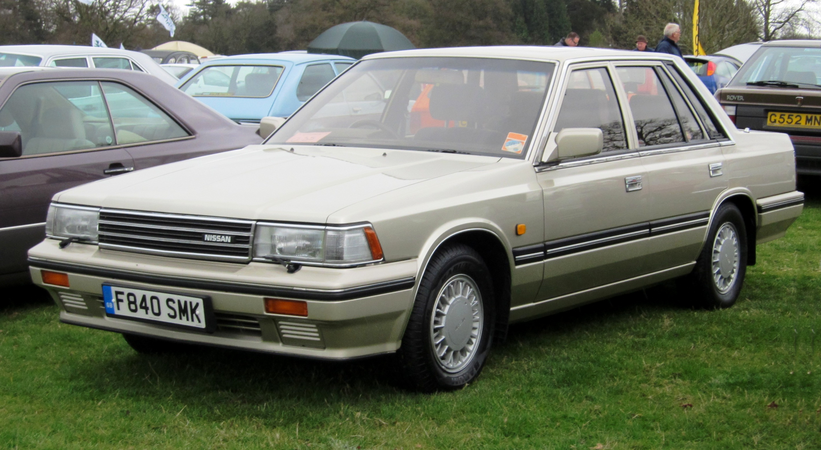 Nissan Laurel at Weston